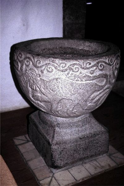 Døbefont i Nim Kirke der ligger små 10 km nordvest for Horsens i det tidligere Nim Herred, Skanderborg Amt, nu Horsens Kommune, Region Midtjylland.